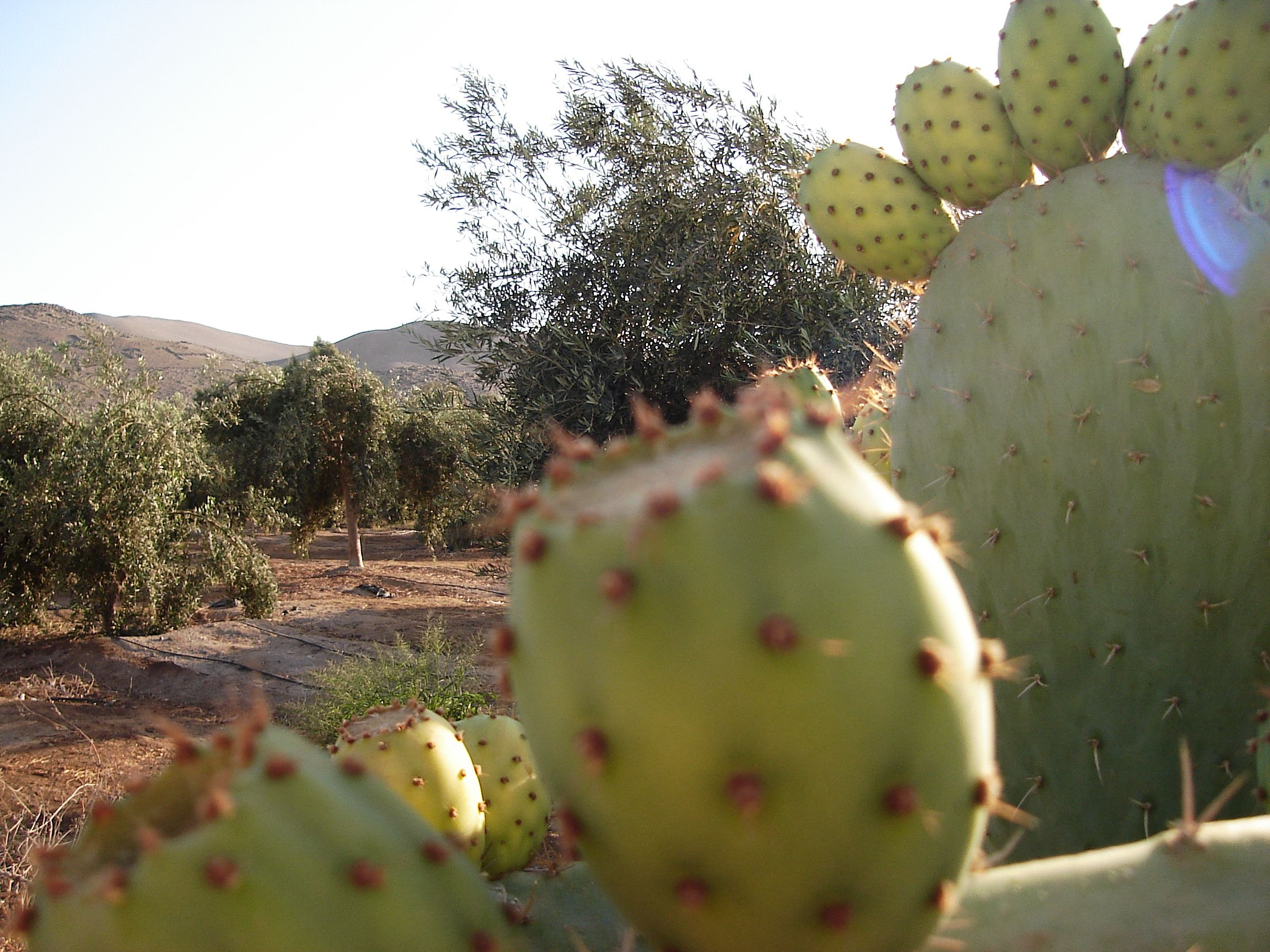 Foto tirada por mim, em Arica.